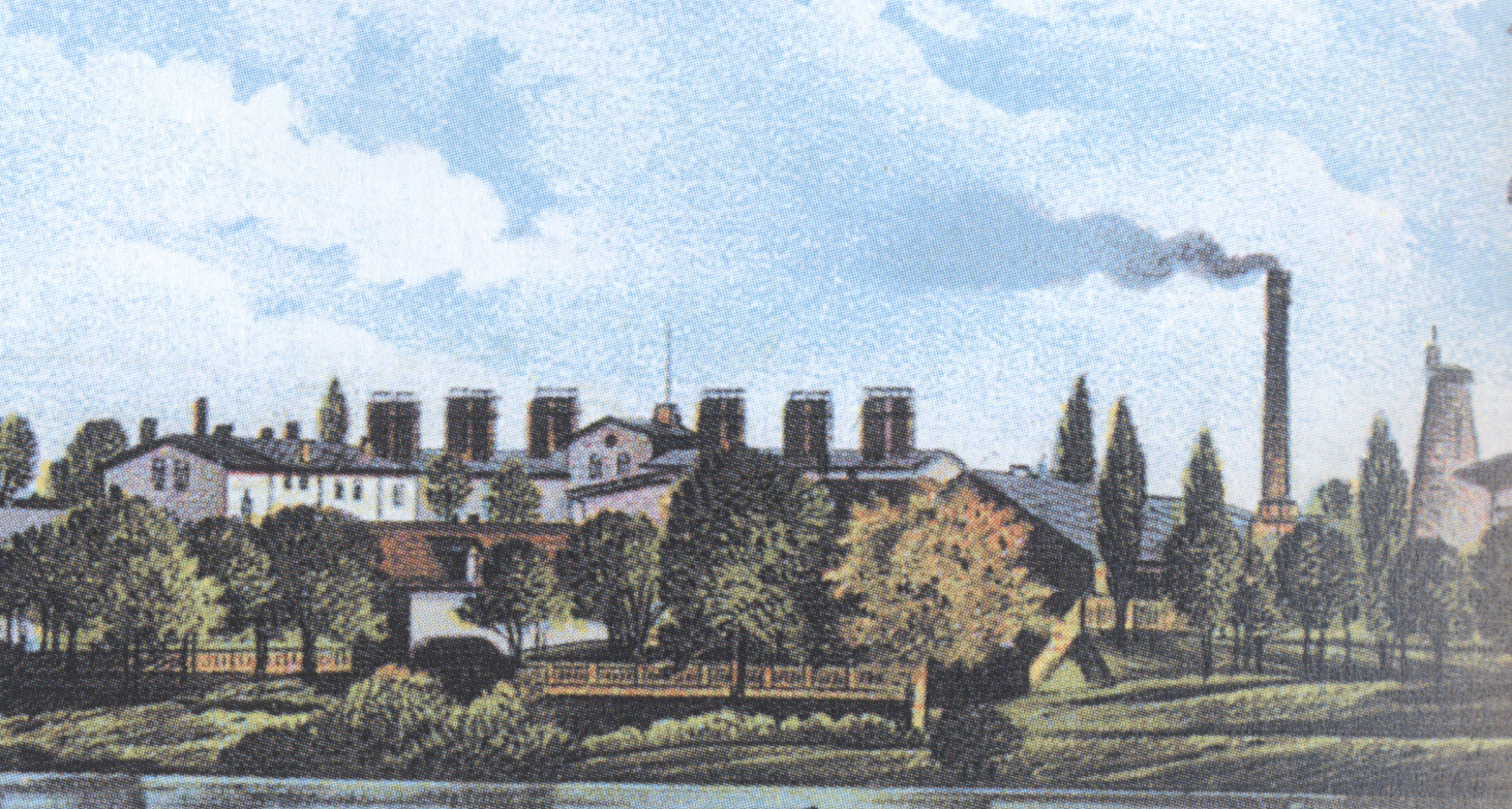 Blick von der Elbseite auf die Glashütte A. Grafe Nachfolger